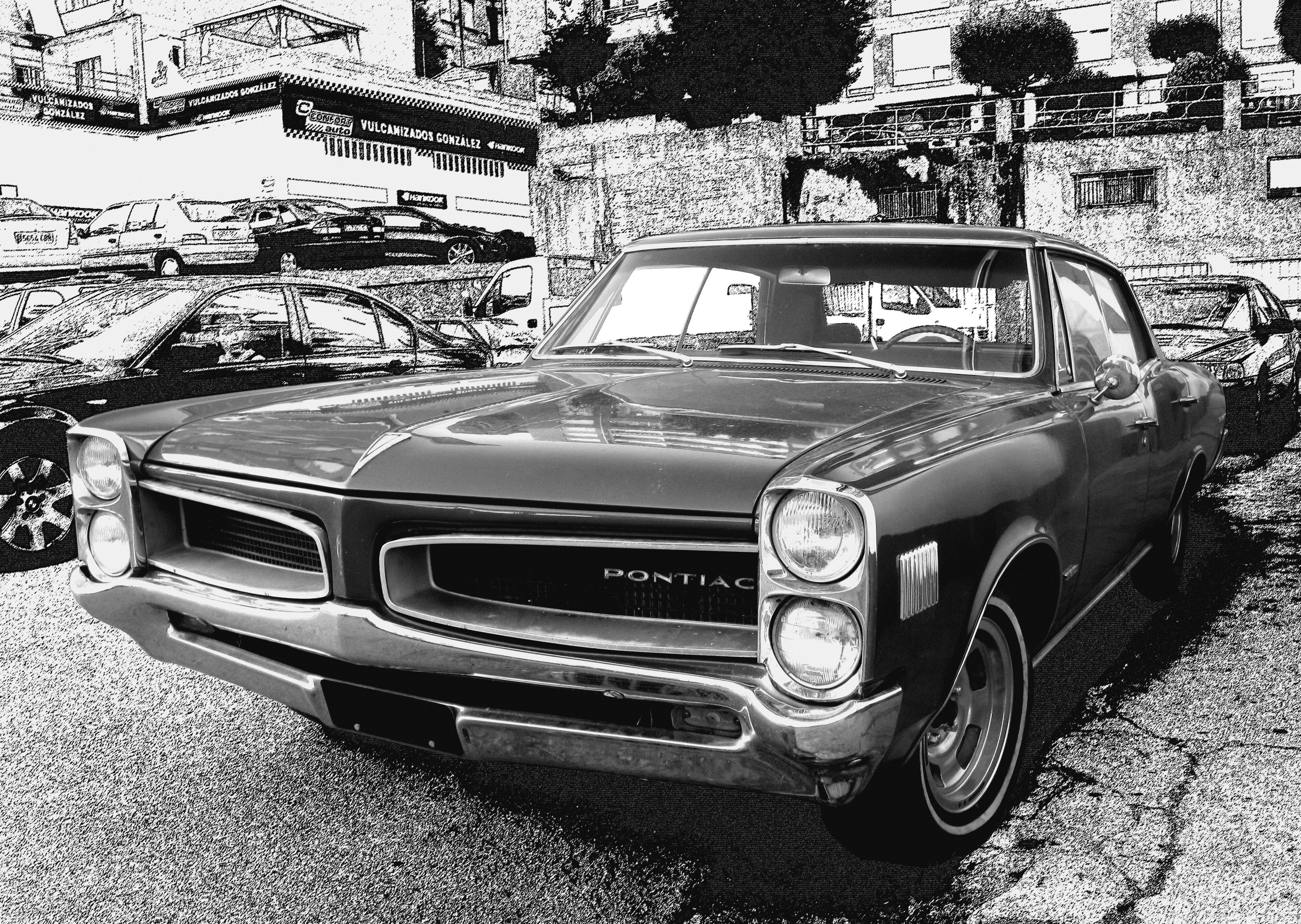 1966 Pontiac LeMans